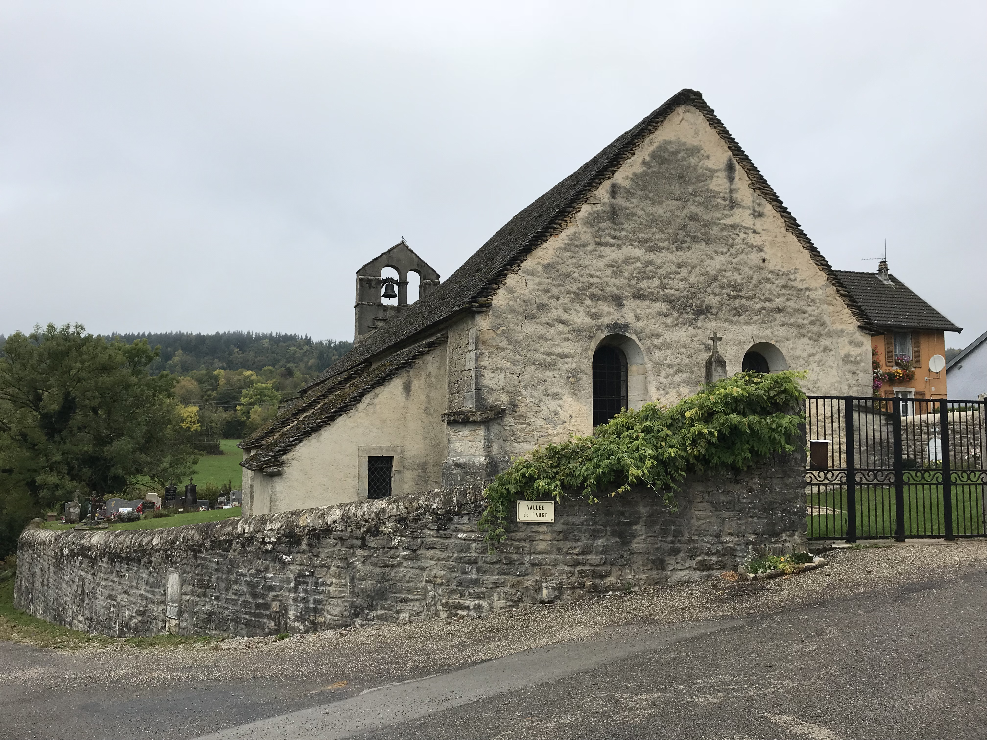 Plaisia (Jura, France) en octobre 2017.